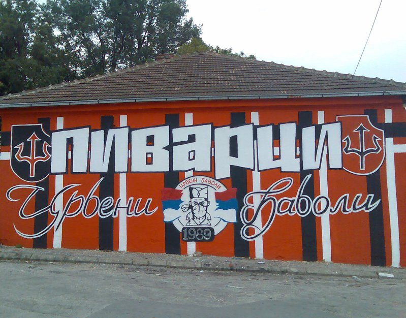 Навијачи Радничког 1923 из Крагујевца